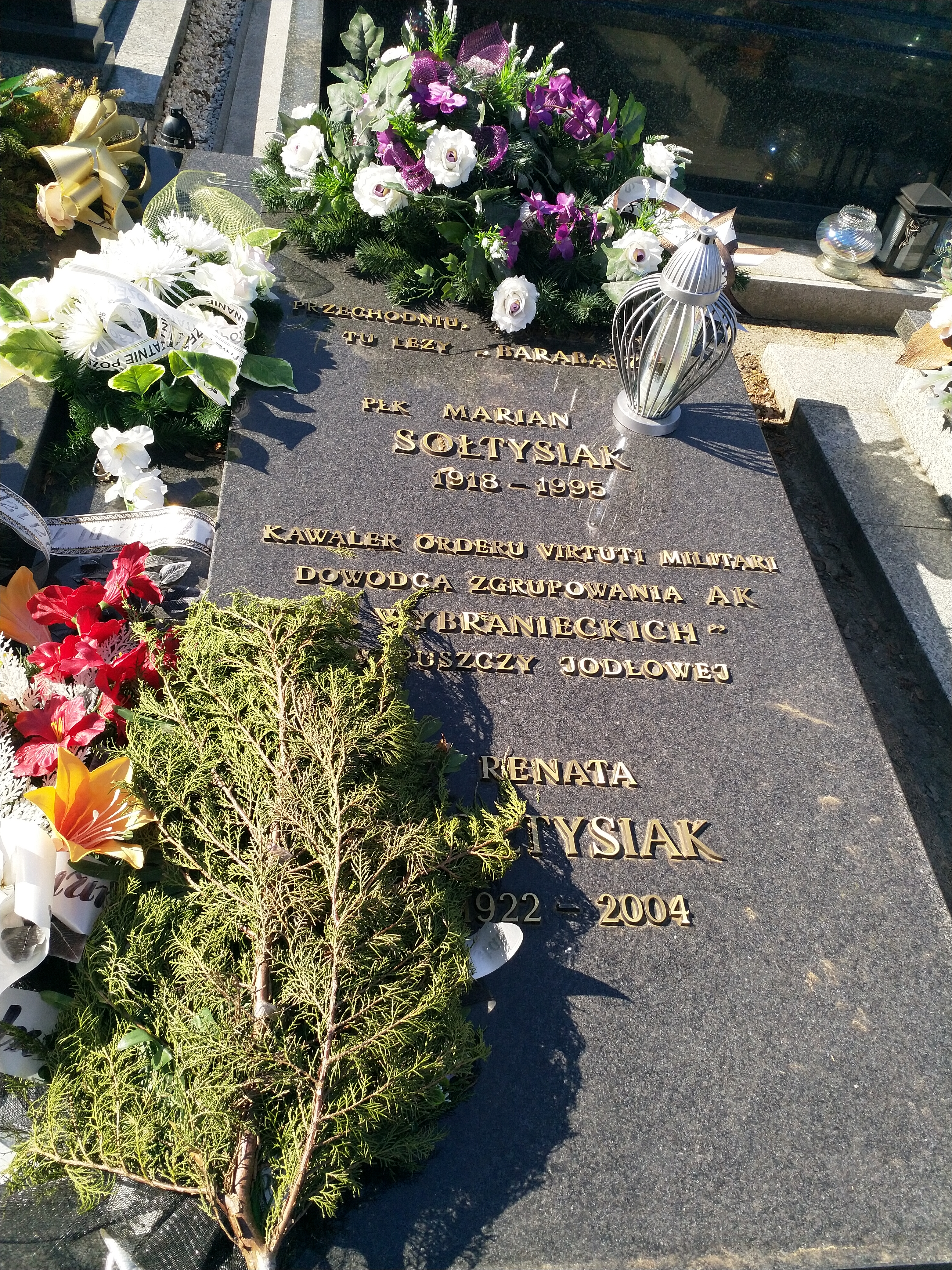 Grób Mariana Sołtysiaka na Cmentarzu Komunalnym i Wojskowym w Ełku